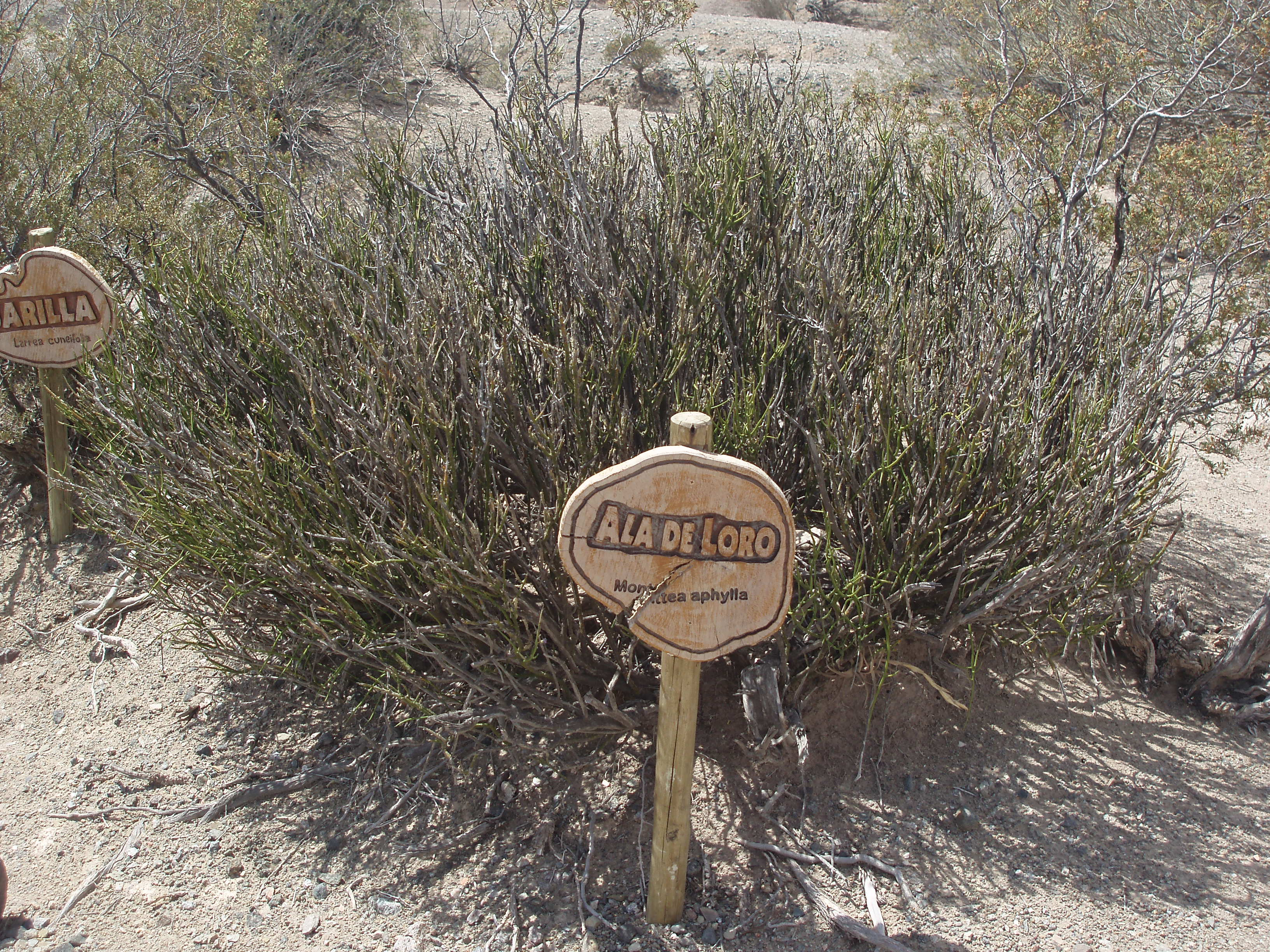 Monttea aphylla, Parque Provincial Ischigualasto, Argentina